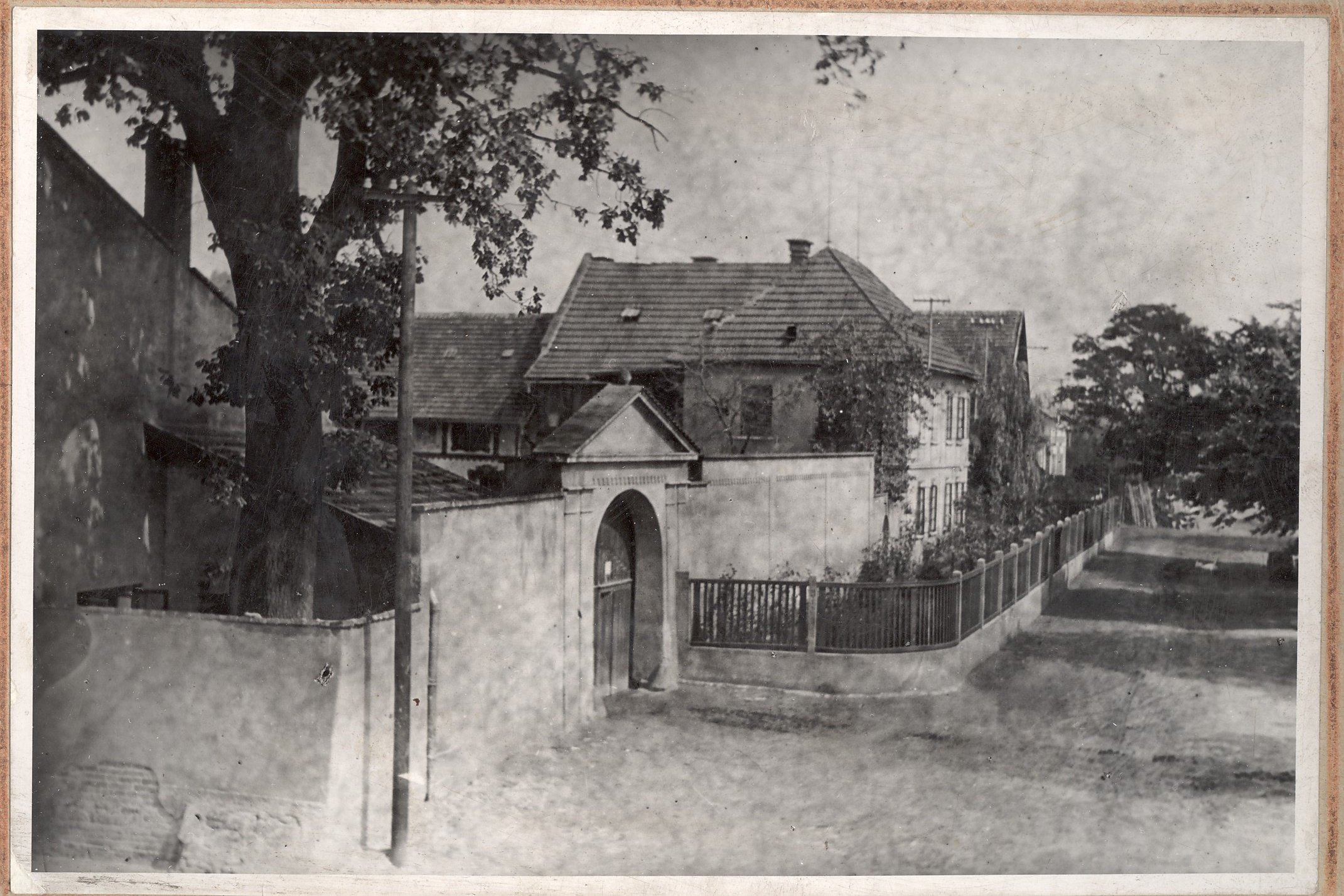 Statek rodiny Herbstů od jihu